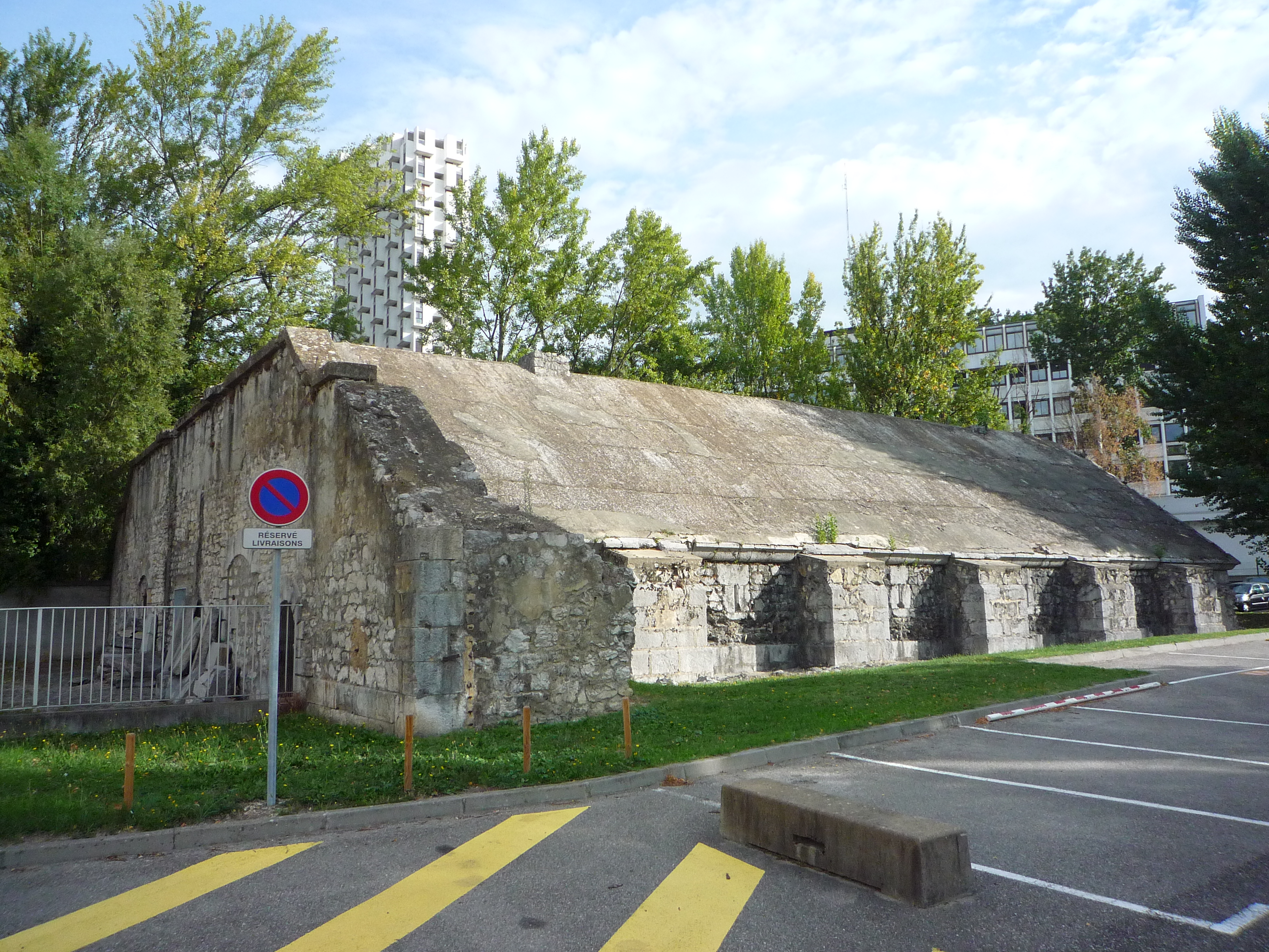 Poudrière de Vauban (1700) - Grenoble